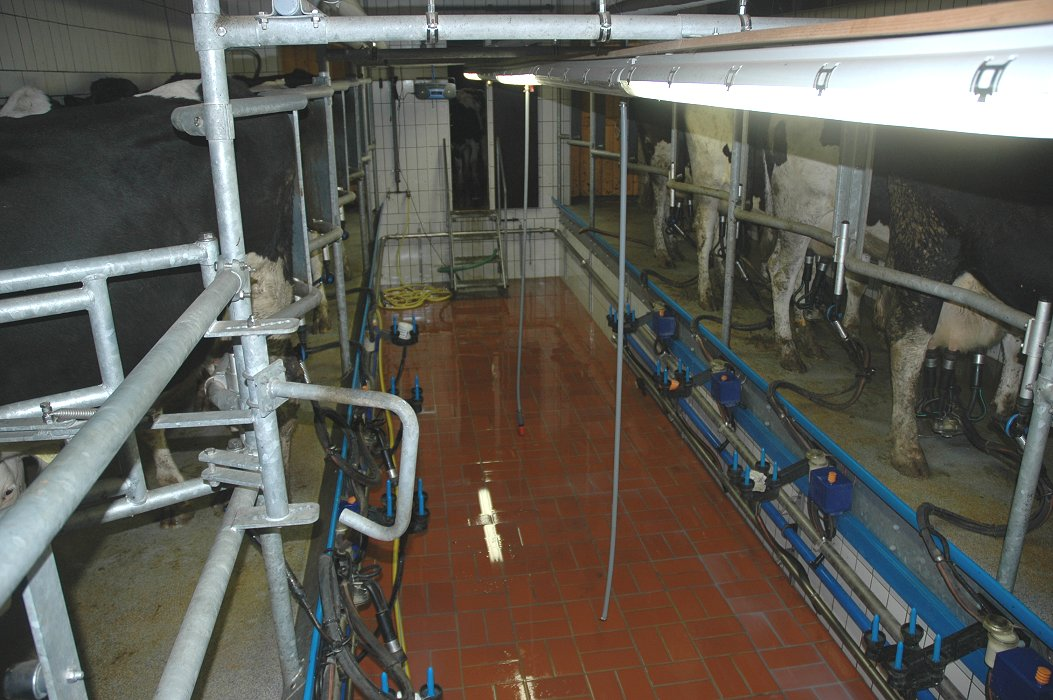 im Melkstand